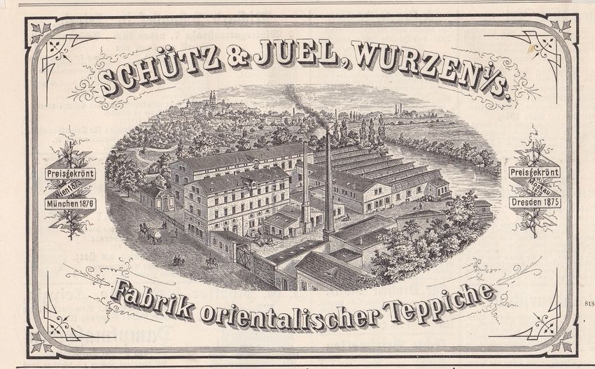 Die Wurzener Teppichfabrik 1880